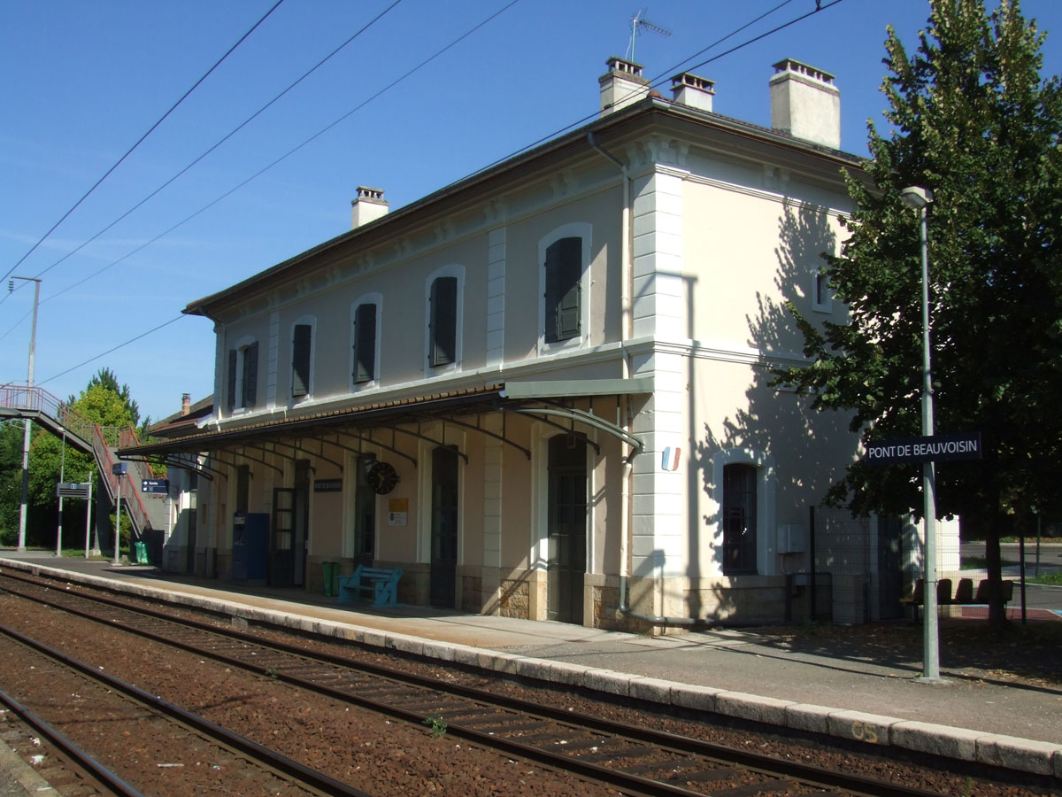 Gare ferroviaire de Pont-de-Beauvoisin (Isère) - France